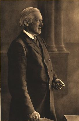 Ulrich von Wilamowitz-Moellendorff (1848–1931), Dreiviertelfigur stehend nach rechts; Kopf im Profil